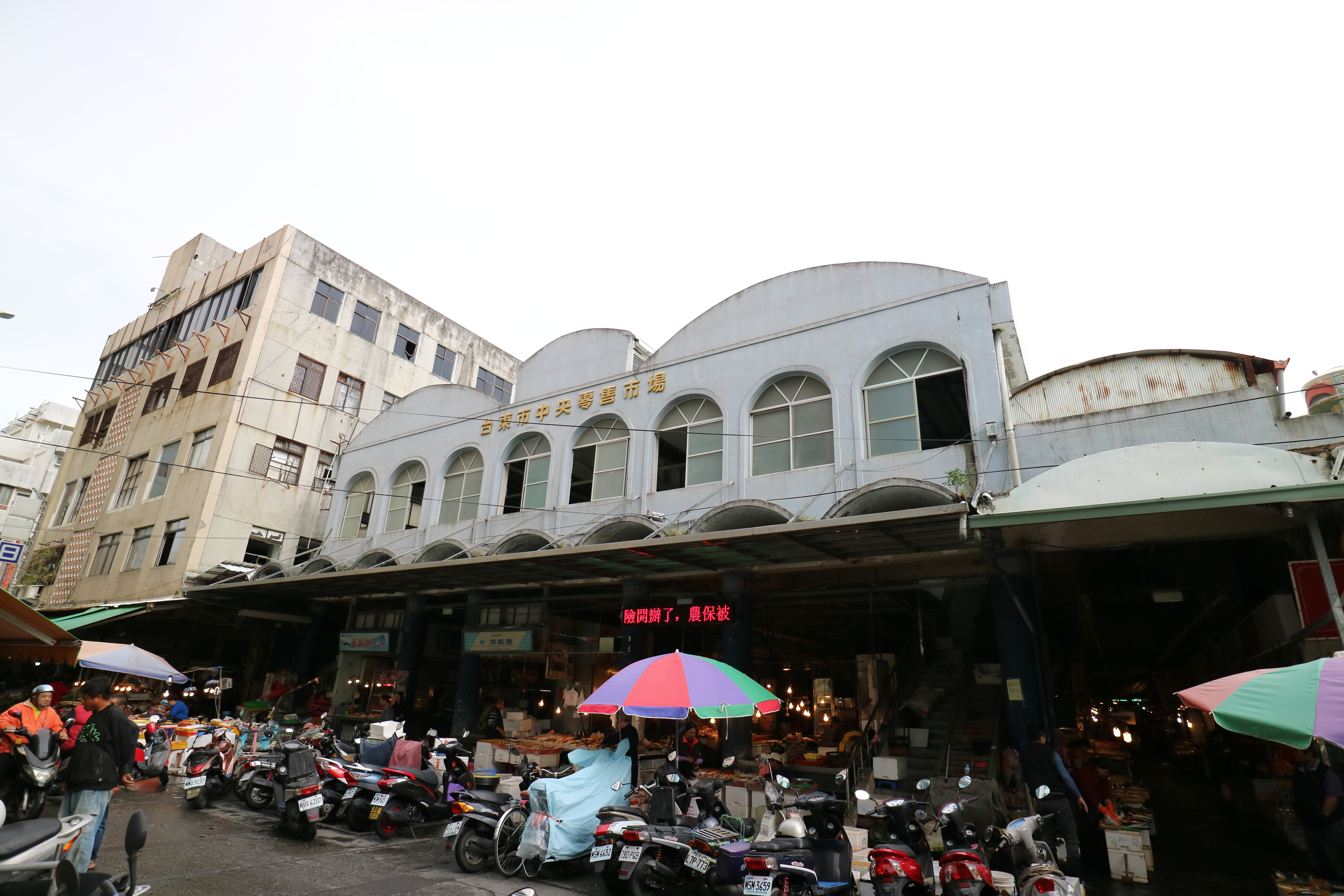 臺東市中央市場大門